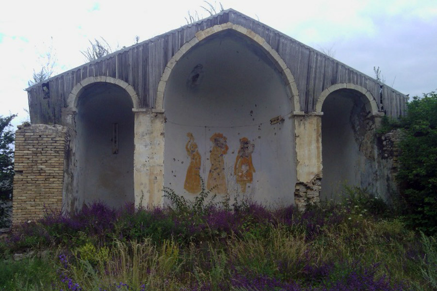 Շուշիի Մեղրեցոց եկեղեցին կառուցվել է 1838 թ. Մահտեսի Հախումյանցի հովանավորությամբ: 1920 թ. Շուշիի ջարդերի ժամանակ ավերվել է, իսկ 1960 թ. ադրբեջանական իշխանության կողմից քանդվել է և հարմարացվել ամառային կինոթատրոնի: Այսօր Մեղրեցոց եկեղեցին շարունակում է մնալ նույնը